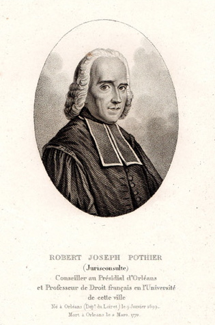 Robert-Joseph Pothier (1699-1872)